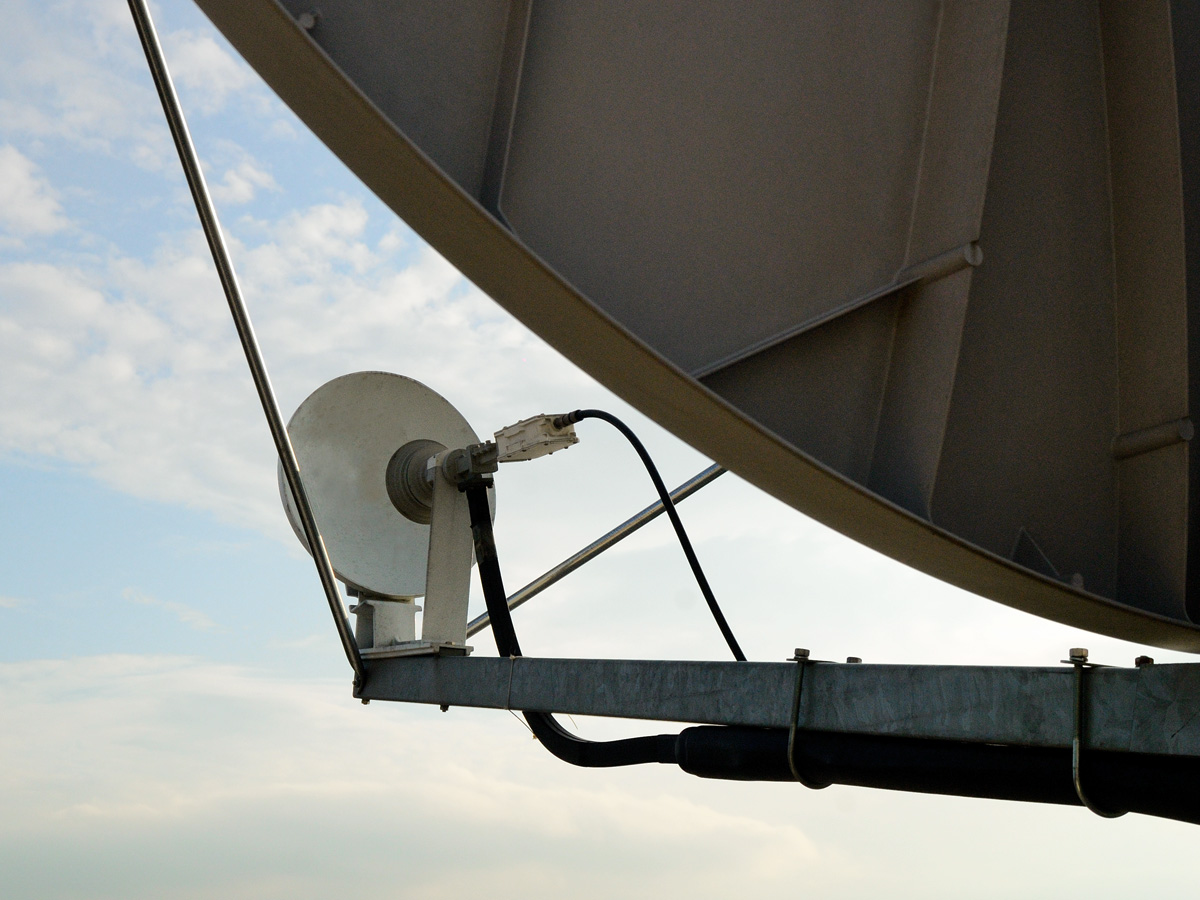 облучатель двухзеркальной антенны Andrew Ku-диапазона